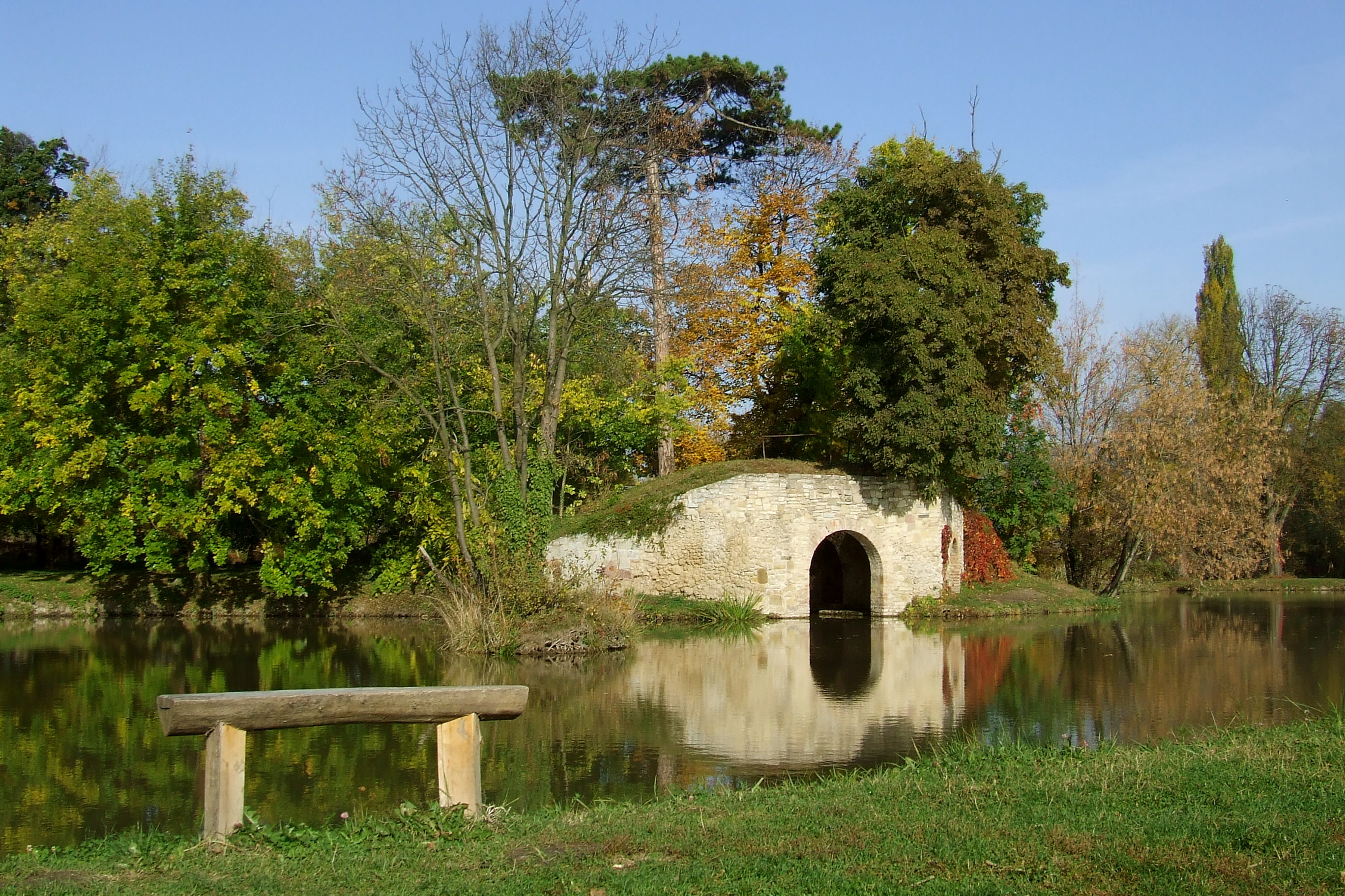 Pellérd, Halastó